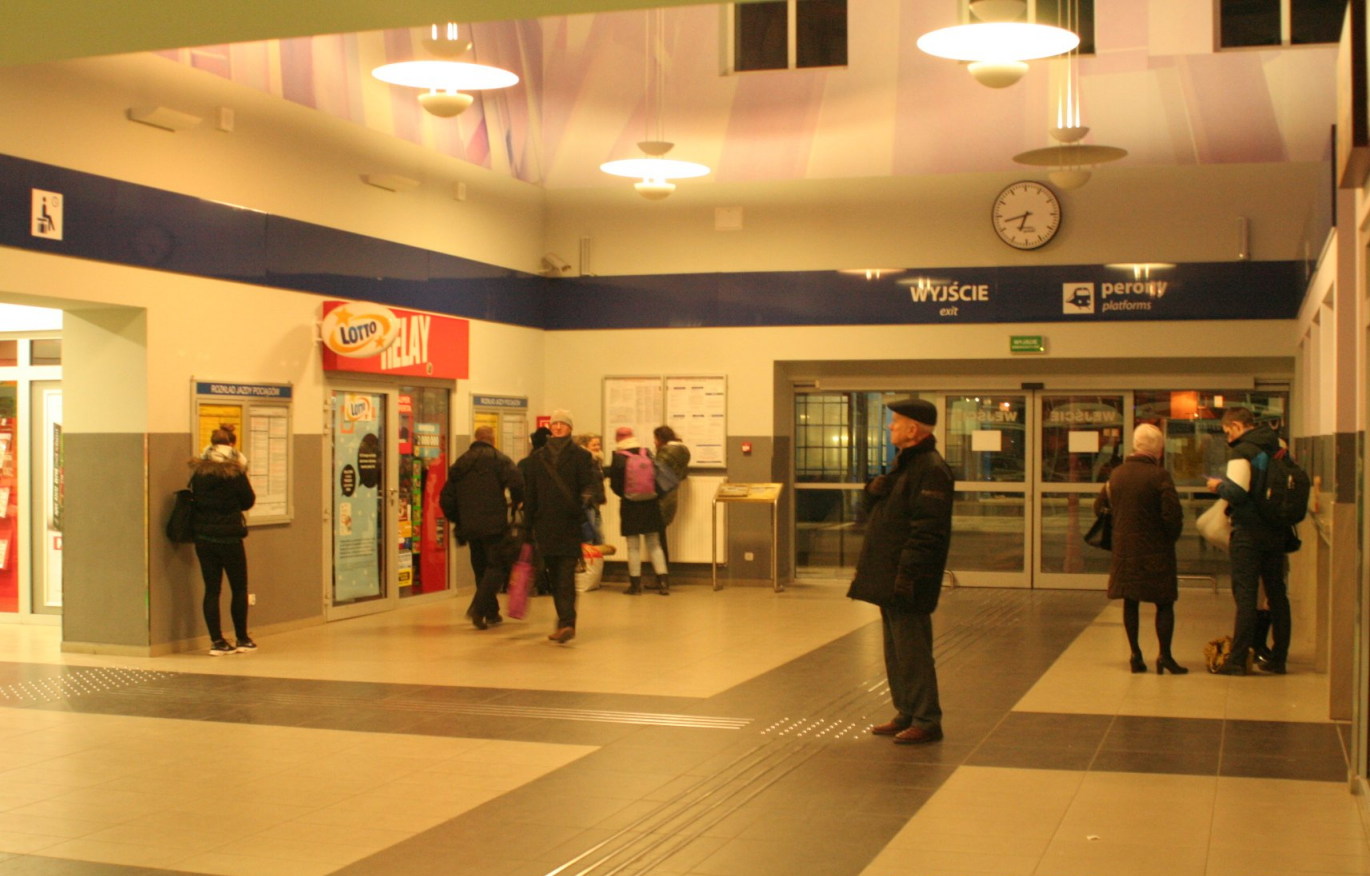 Wnętrze dworca kolejowego w Elblągu